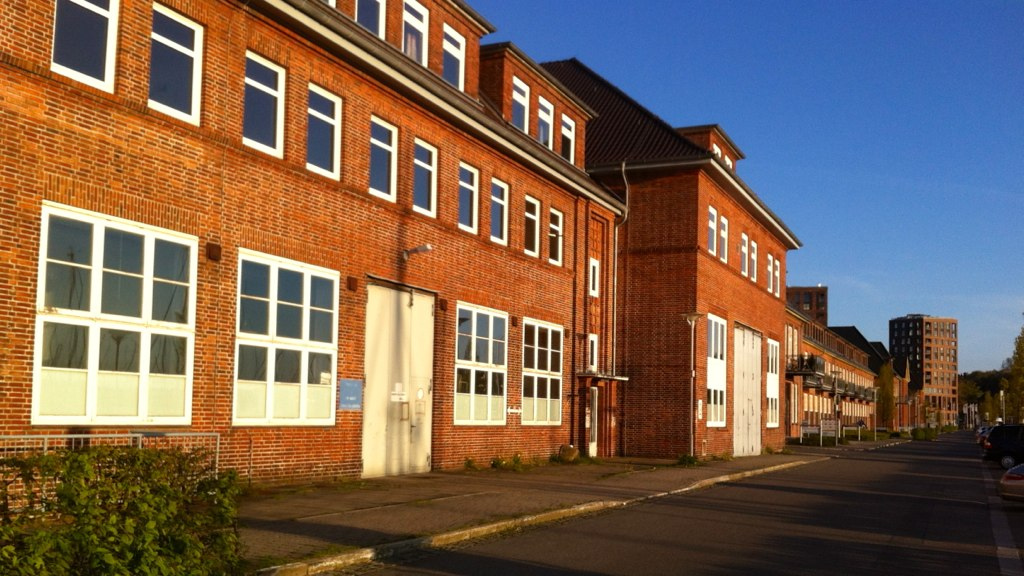 Sonwik noch nicht zivil genutzter Teil